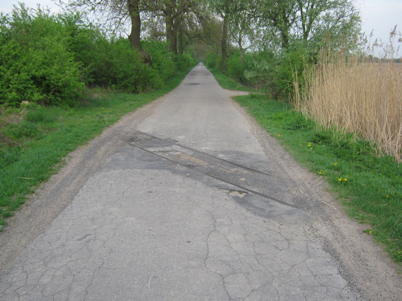 Resztki przejazdu kolejowego w Mikołajewicach (droga Mikołajewice- Arcugowo)